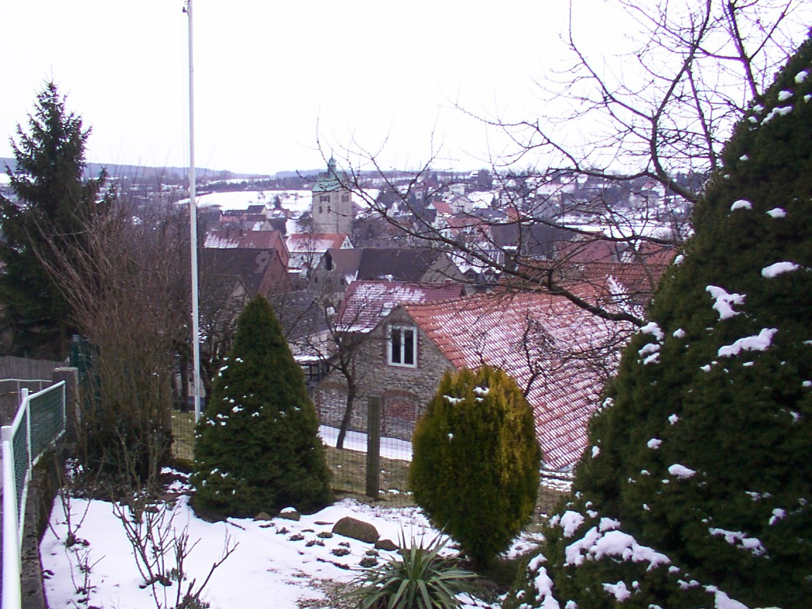 Paderborn: Blick auf das verschneite Neuenbeken im März 2006